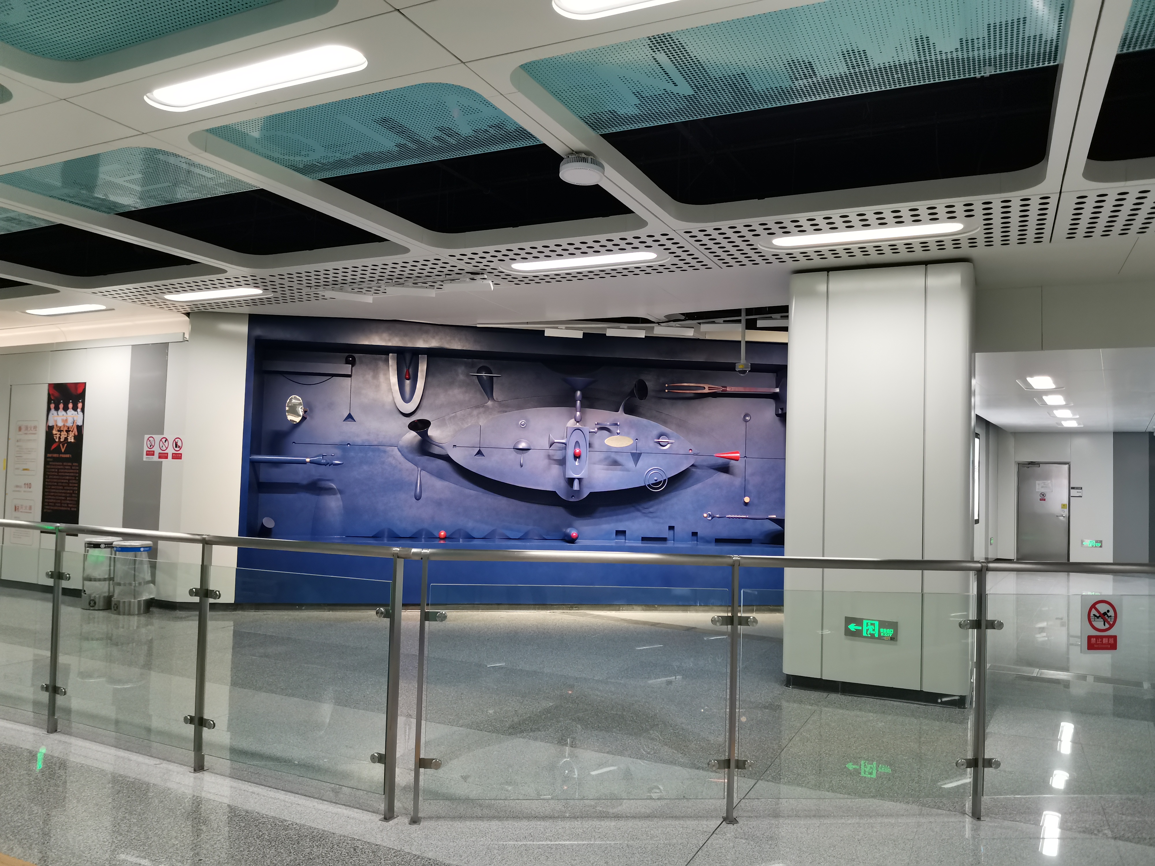 前湾站艺术墙之一，位于五号线站厅区